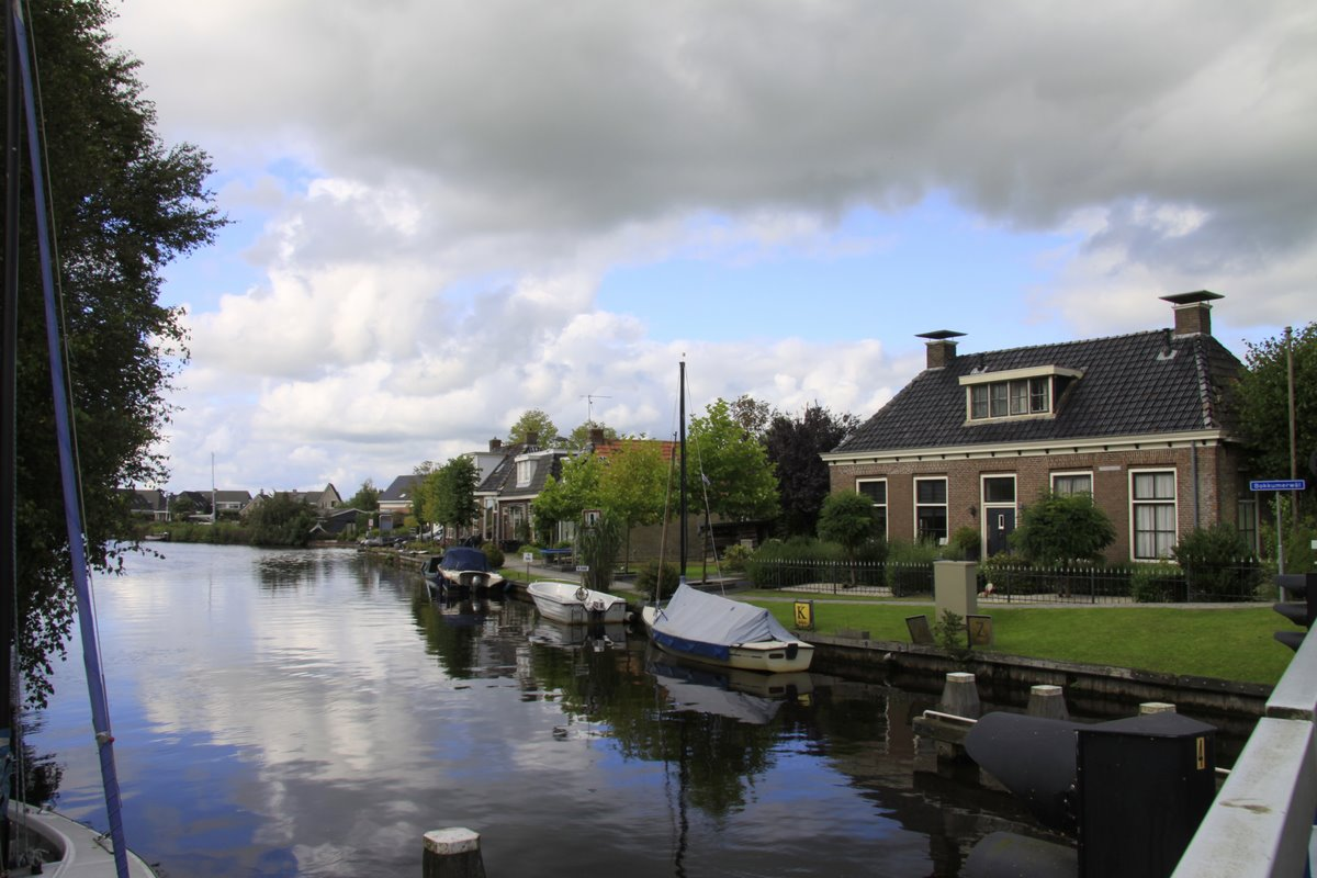 Nes ligt aan het riviertje De Boorn niet ver van Akrum in de Provincie Friesland